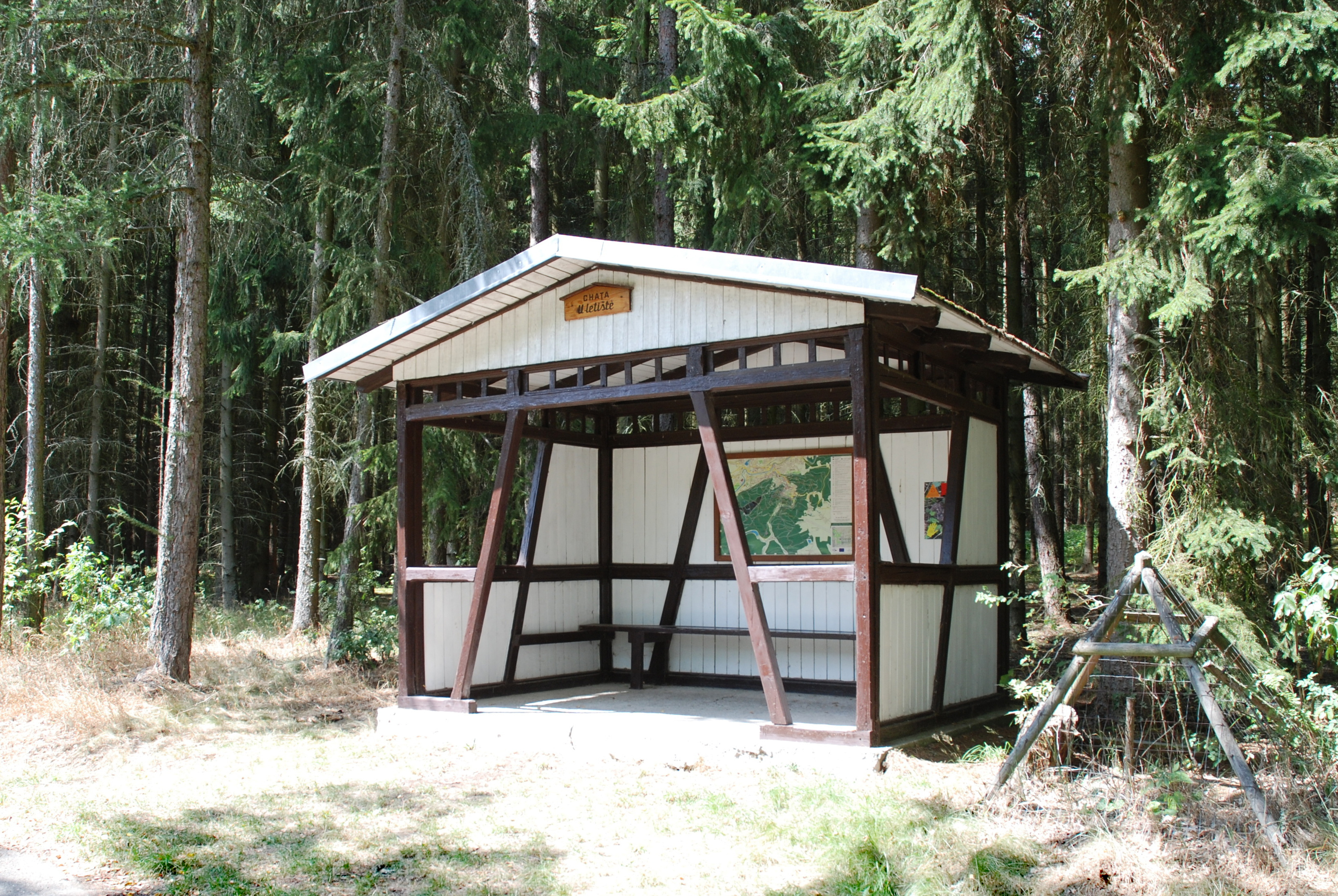 Chata U Letiště v karlovarských lázeňských lesích u Okružní cesty